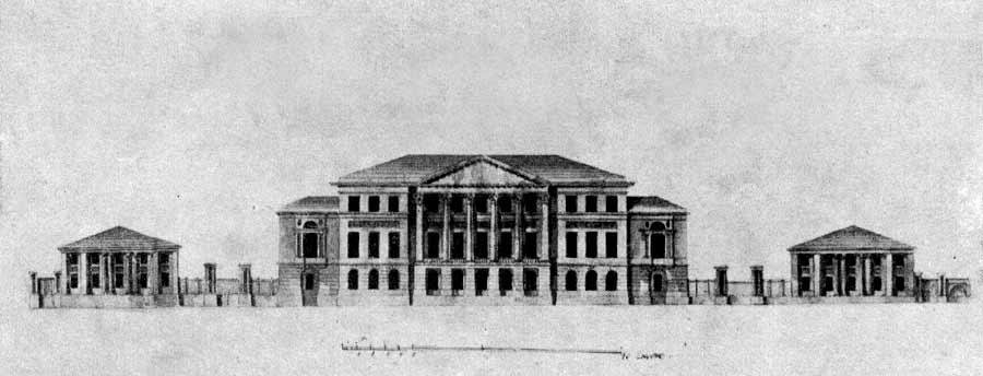 Дом М.П. Губина на Петровке в Москве. Главный фасад. Чертеж из архитектурного альбома М.Ф. Казакова.